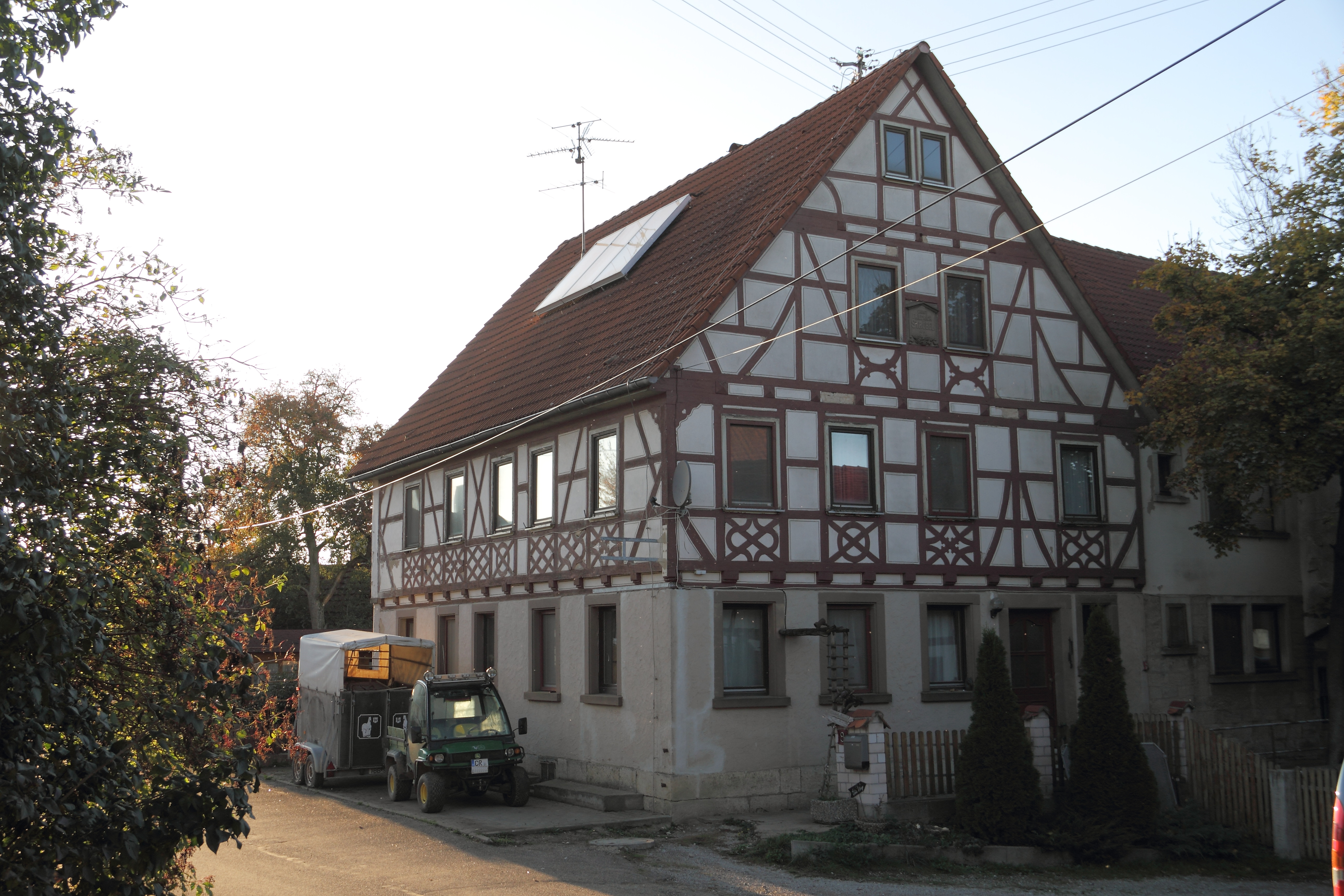 Das denkmalgeschützte Haus in Wolkersfelden 10.